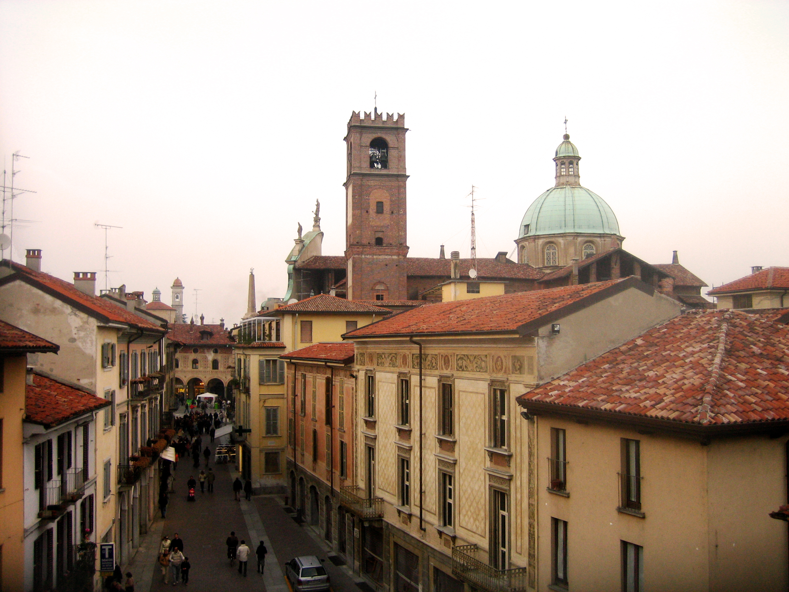 Vigevano, Lombardia, Italiavigevano stret